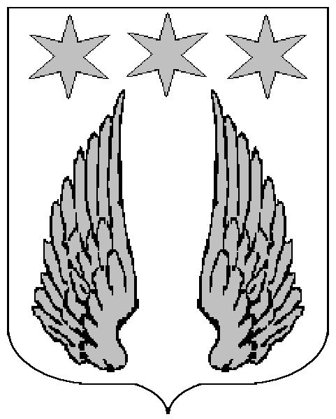 Grb obitelji Šubić